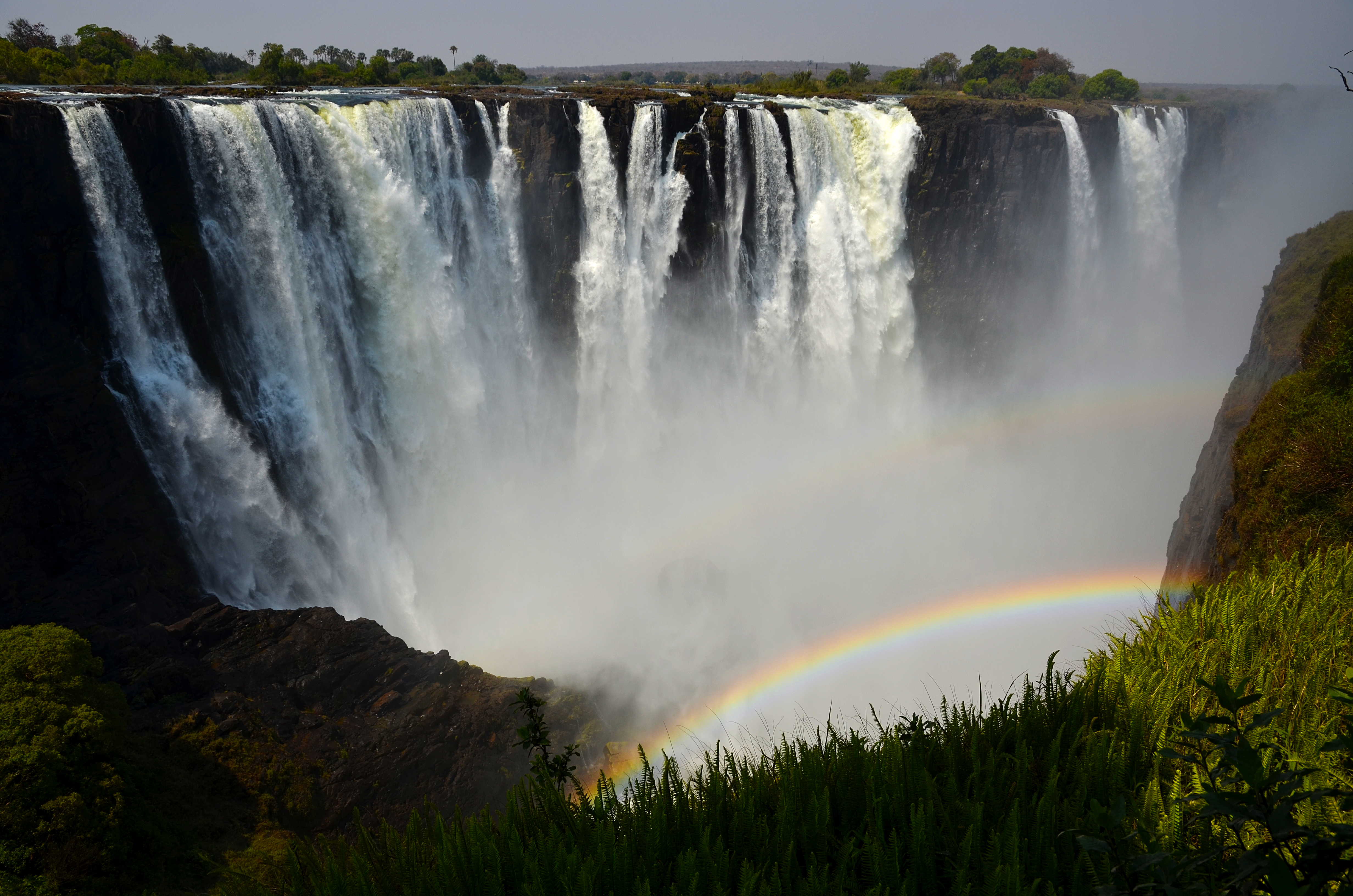 Victoria Falls - Zimbabwe